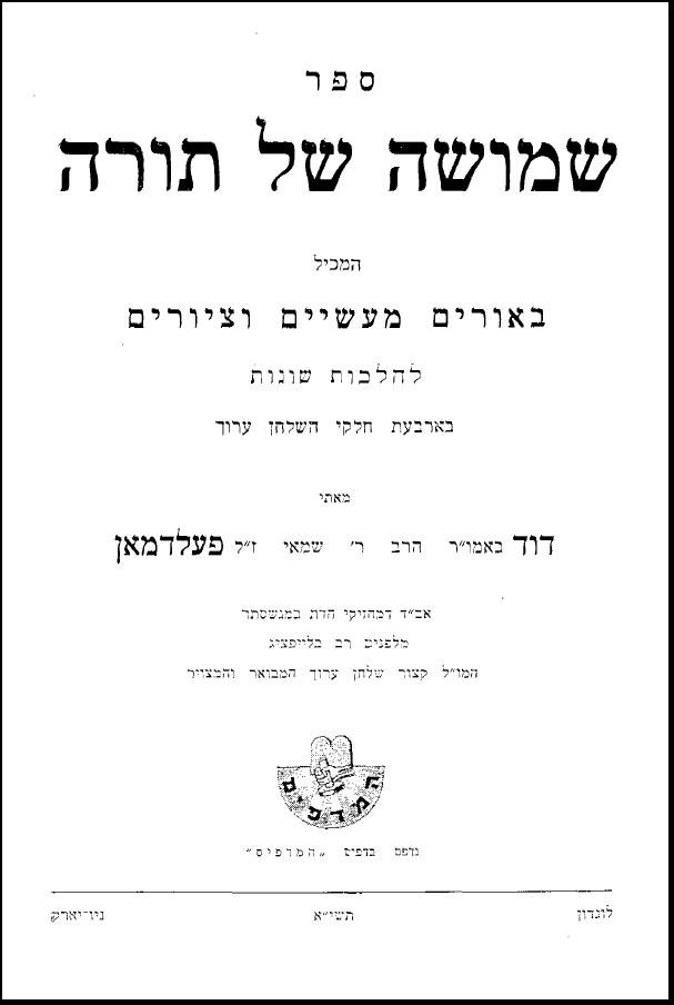 כריכה לספר שמושה של תורה